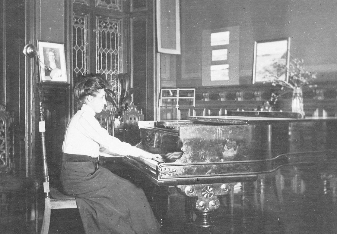 Byggnadschefrn Otto Alrutz hem, Valhallavägen 104-106 (hustrun sitter vis pianot)